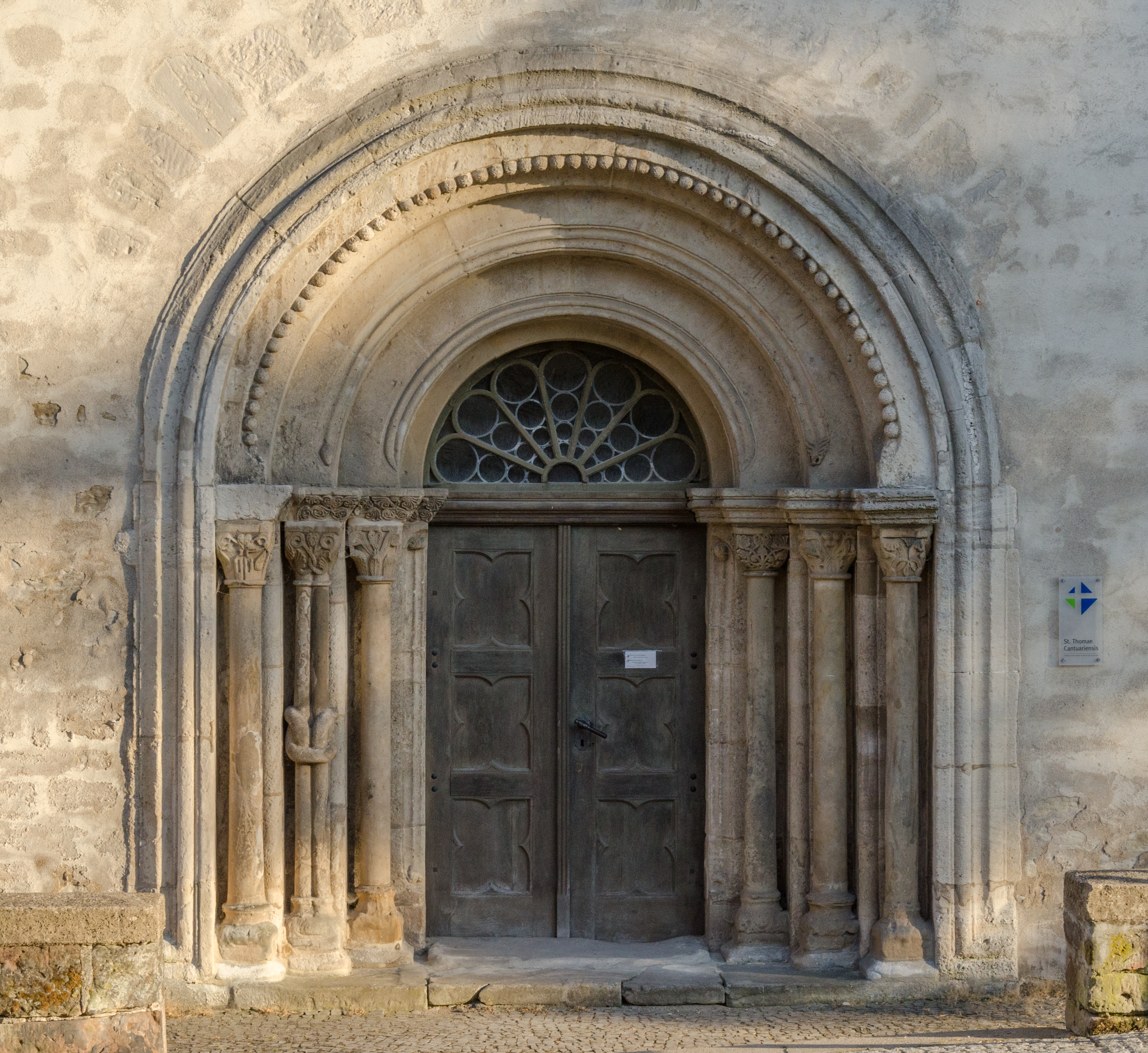 Merseburg, Neumarkt, Kirche St. Thomae